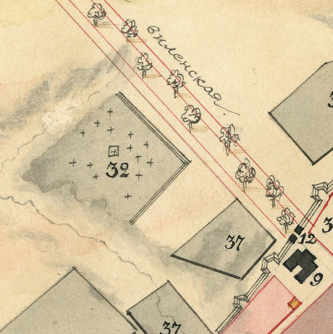 Беларуская (тарашкевіца): Магілёў (Магілёў). Плян места